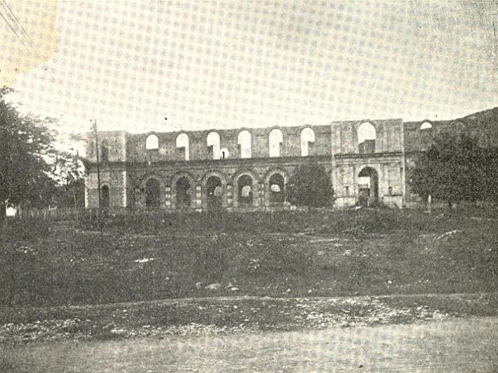 Cuartel de la policia en construcción. Santiago de Cali, fecha por identificar.